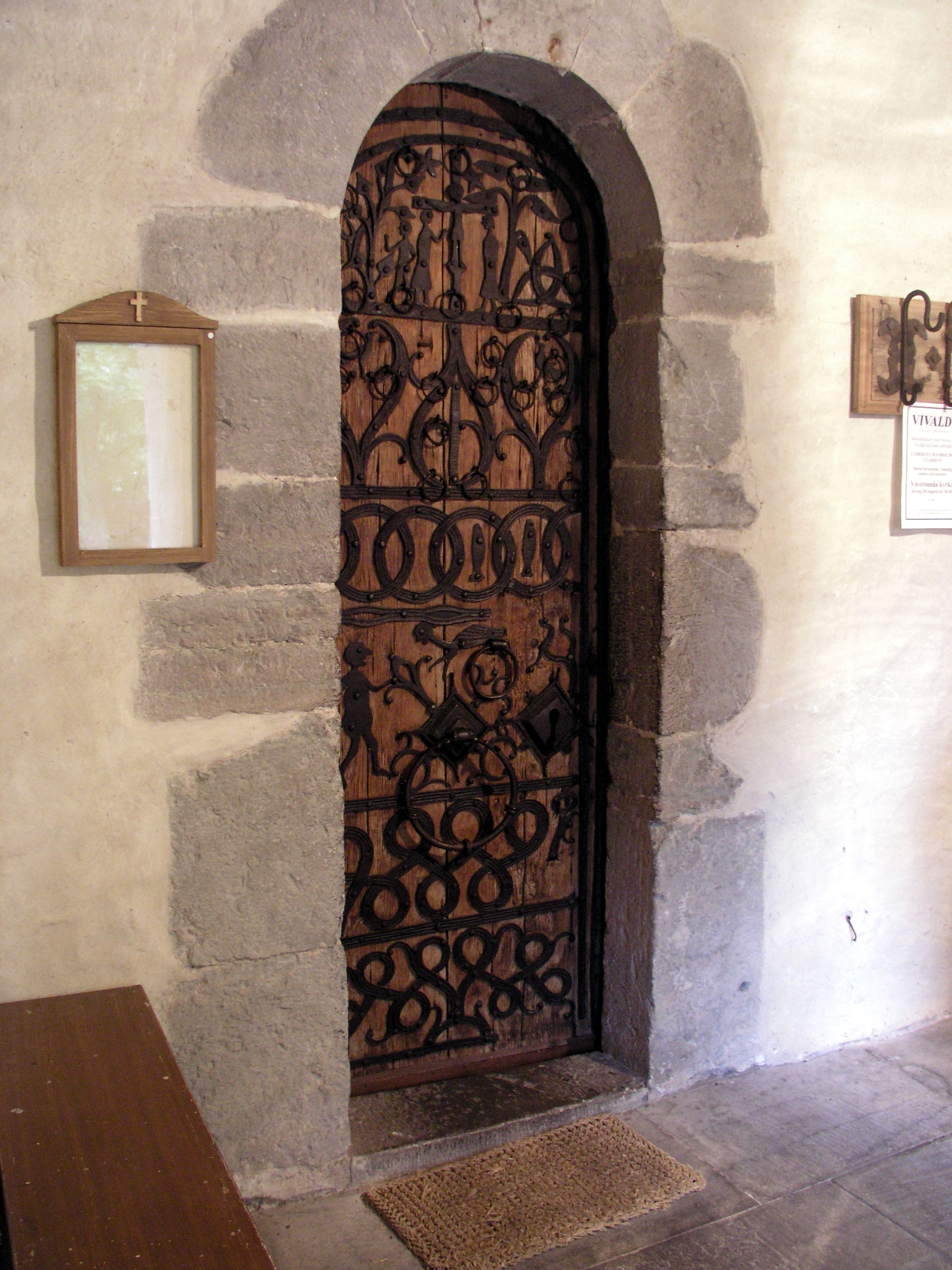 Väversunda kyrka / Väversunda church. The picture was taken by Håkan Svensson (Xauxa) the 30th of July 2005.